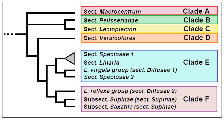 Linajola (Linaria)_-_Cladogramma_del_genere